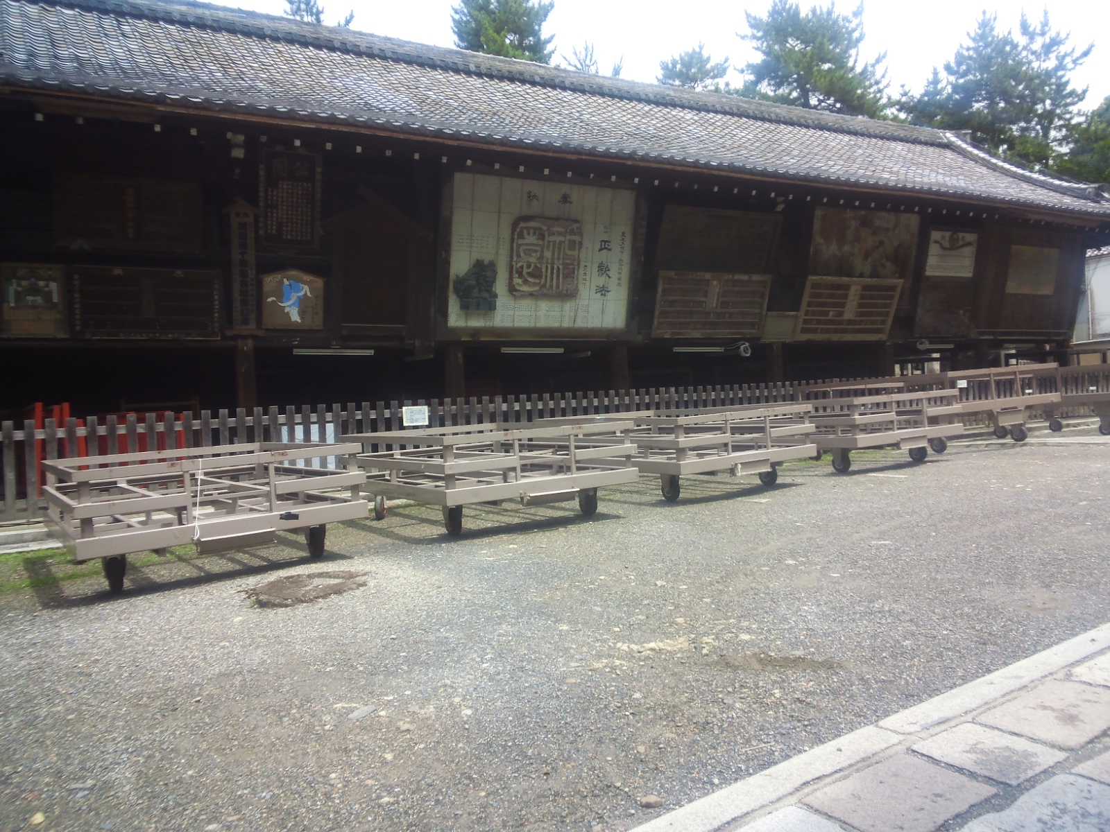 八坂神社 絵馬殿